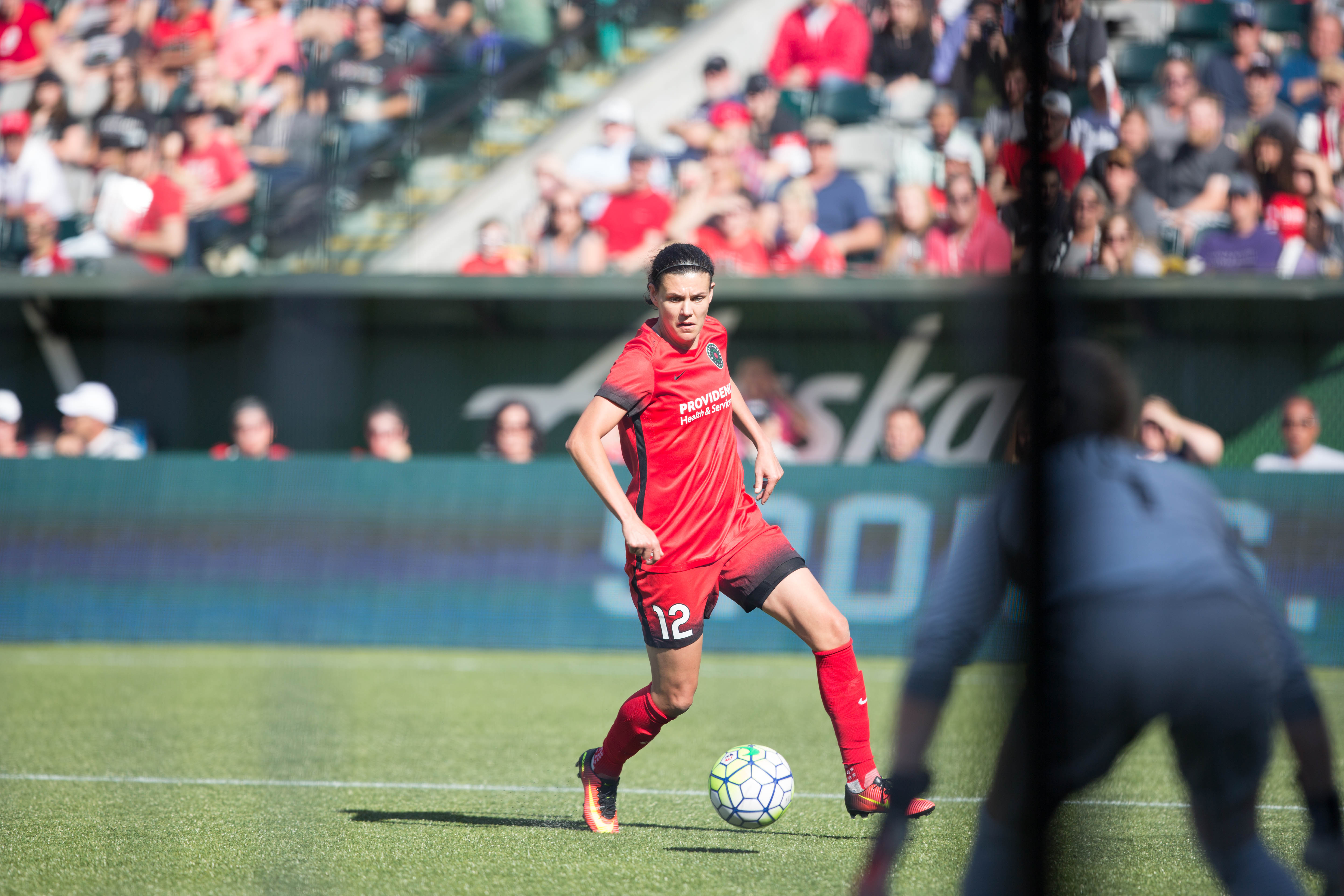 N42A2793.jpg